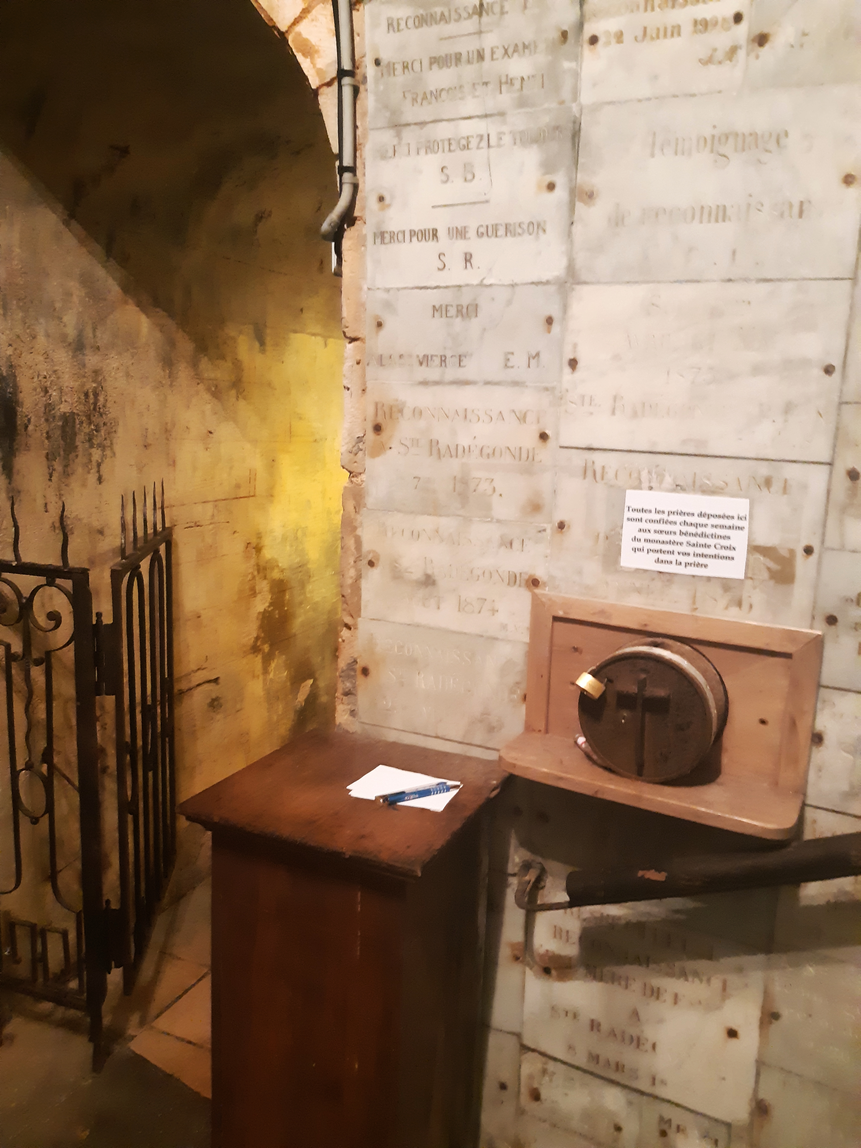 Entrée de la crypte de l'église Sainte-Radegonde de Poitiers, avec ex-votos et une urne recueillant des intentions de prières pour les sœurs de l'Abbaye Sainte-Croix